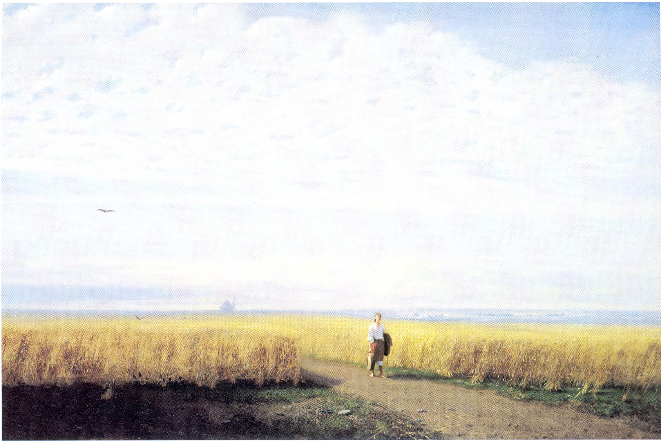 "Степь. Нива". 1875. холст, масло, 69,5х109,5 см.